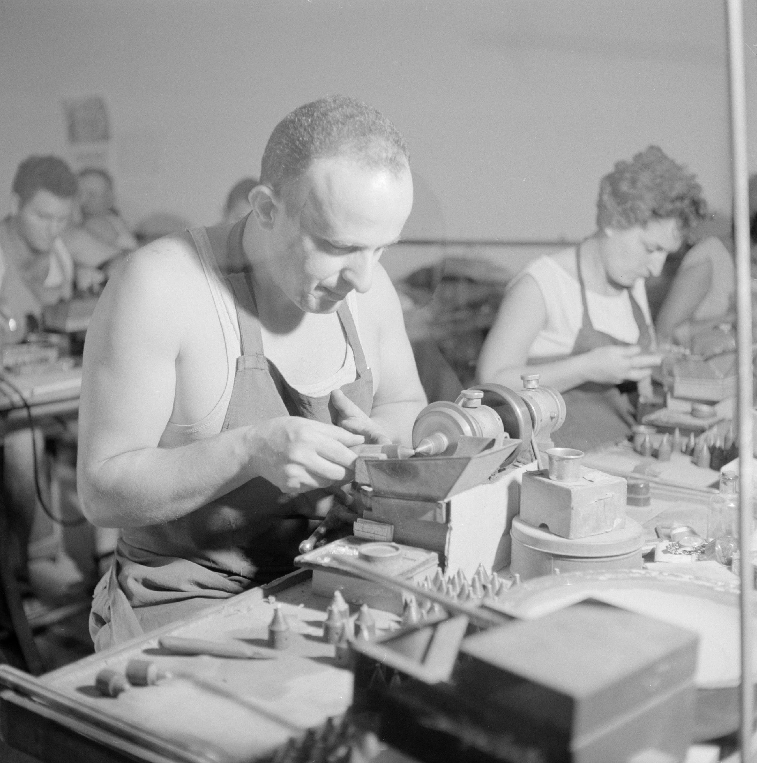 Collectie / Archief : Fotocollectie Van de Poll Reportage / Serie : [ onbekend ] Beschrijving : Diamantbewerkers (diamantslijpers) aan het werk in Natanya Datum : 1 januari 1964 Locatie : Israël, Natanya Trefwoorden : arbeiders, diamantindustrie, diamantslijpers, industrie Fotograaf : Poll, Willem van de, [onbekend] Auteursrechthebbende : Nationaal Archief Materiaalsoort : Negatief (zwart/wit) Nummer archiefinventaris : bekijk toegang 2.24.14.02 Bestanddeelnummer : 255-4366